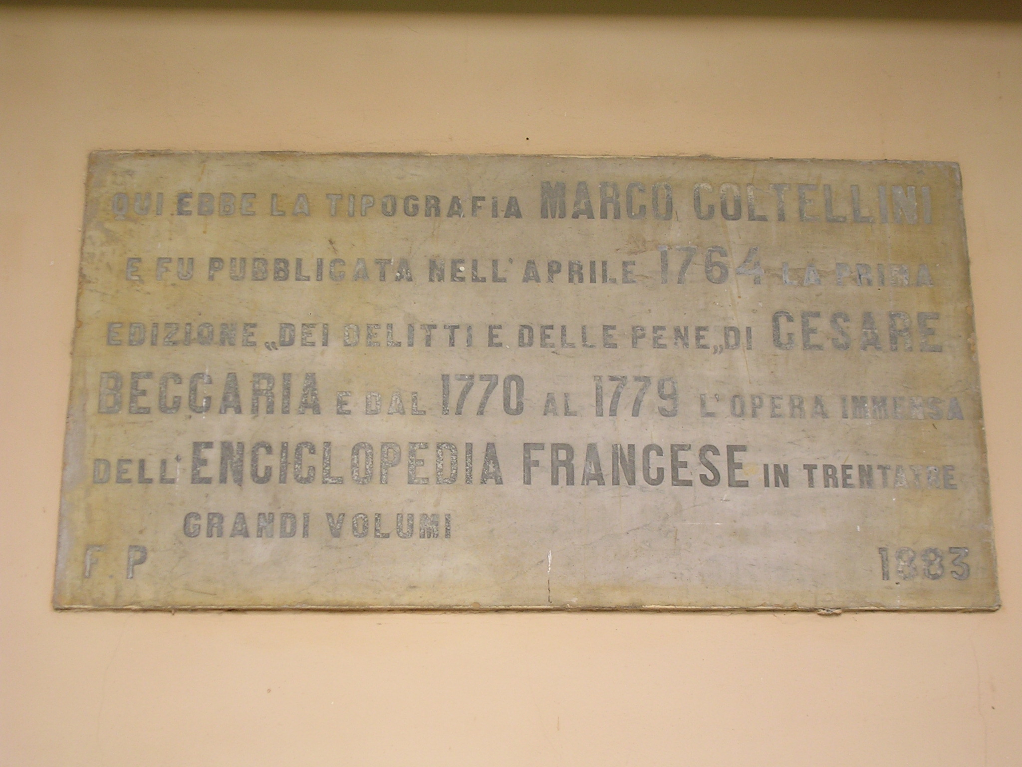 Livorno: lapide commemorativa della Tipografia Coltellini, un tempo ubicata presso lo scomparso Bagno dei forzati; oggi l'epigrafe è collocata nel cortile del Palazzo di Giustizia.